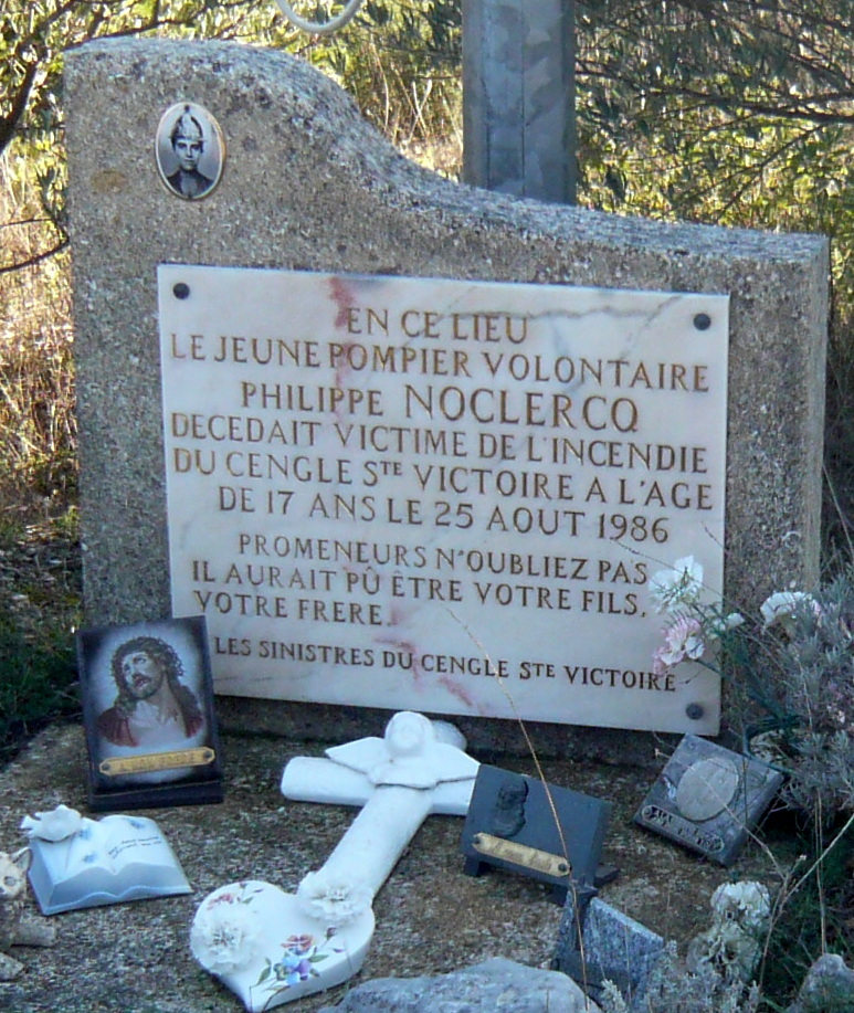 Stèle Philippe Noclercq, pompier volontaire décédé en 1986 dans l'incendie du Cengle Sainte-Victoire, Puyloubier, Bouches-du-Rhône (France). « En ce lieu le jeune pompier volontaire Philippe Noclercq décédait victime de l'incendie du Cengle Sainte-Victoire à l'âge de 17 ans le 25 août 1986. Promeneurs n'oubliez pas il aurait pu être votre fils, votre frère. Les sinistrés du Cengle Sainte-Victoire »